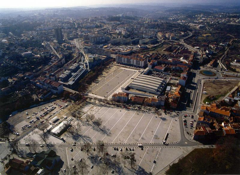 Viseu